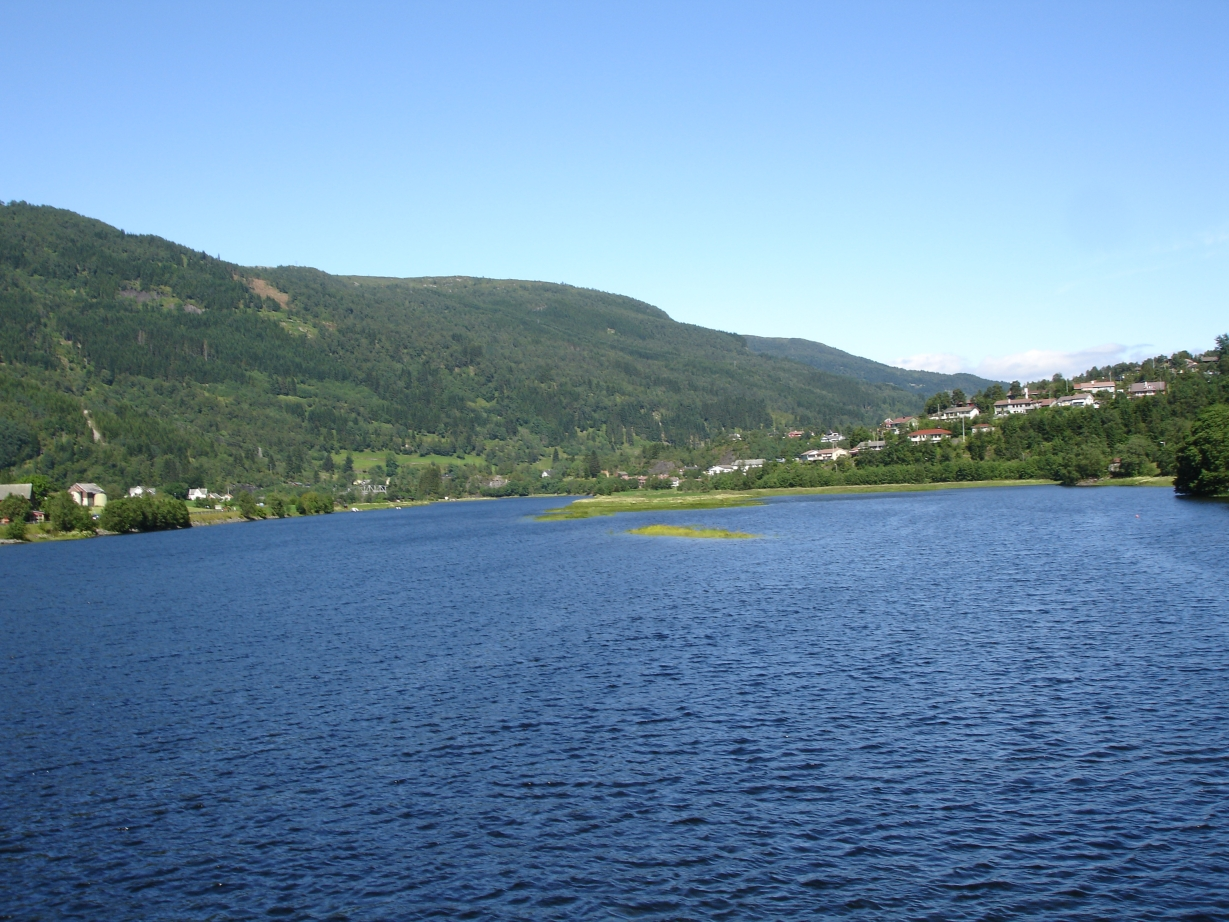 Elva Nausta tatt fra nyebrua i Naustdal.